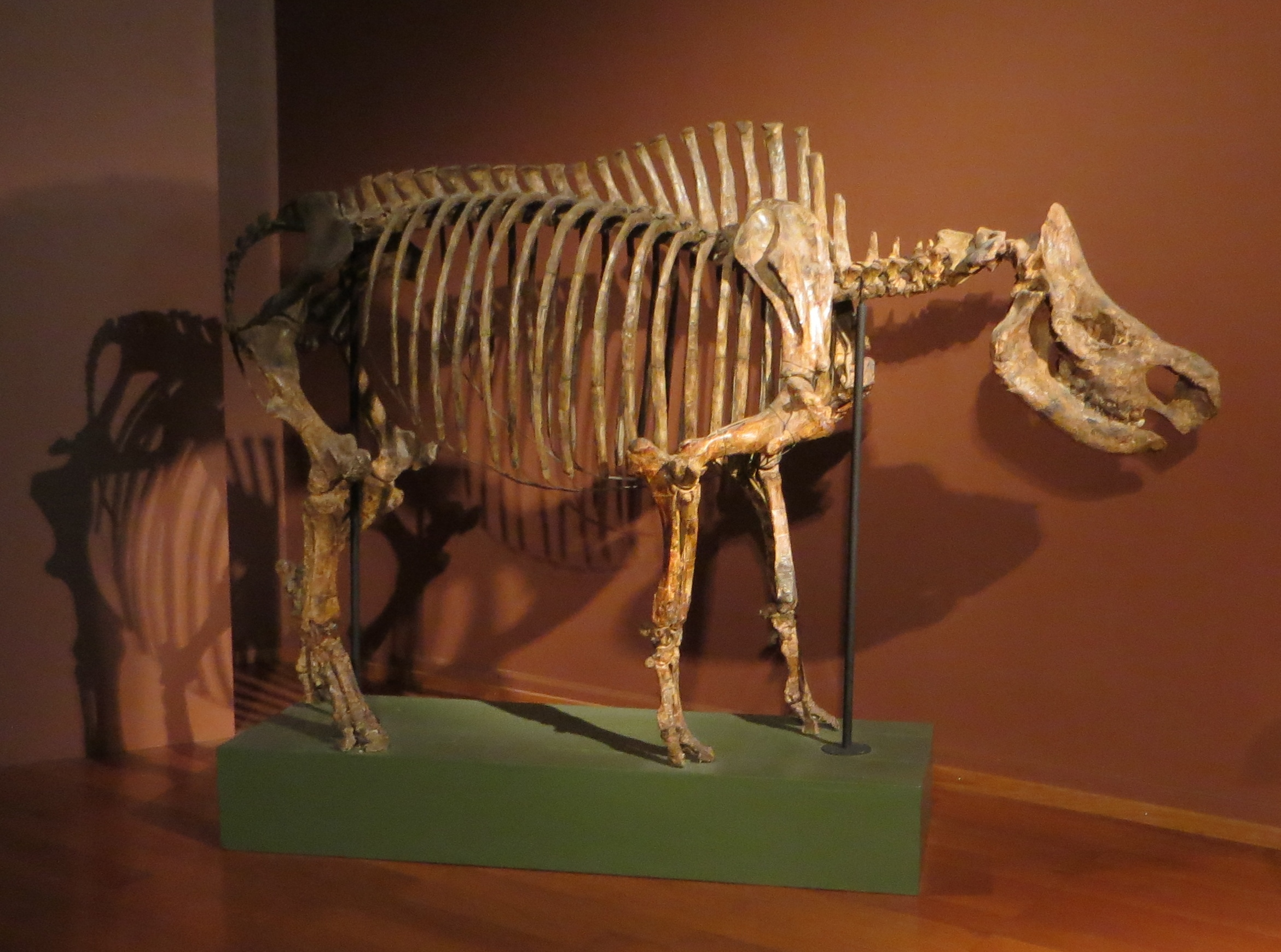 Fossil of Stephanorhinus - Took the picture at Natural History Museum, Basel